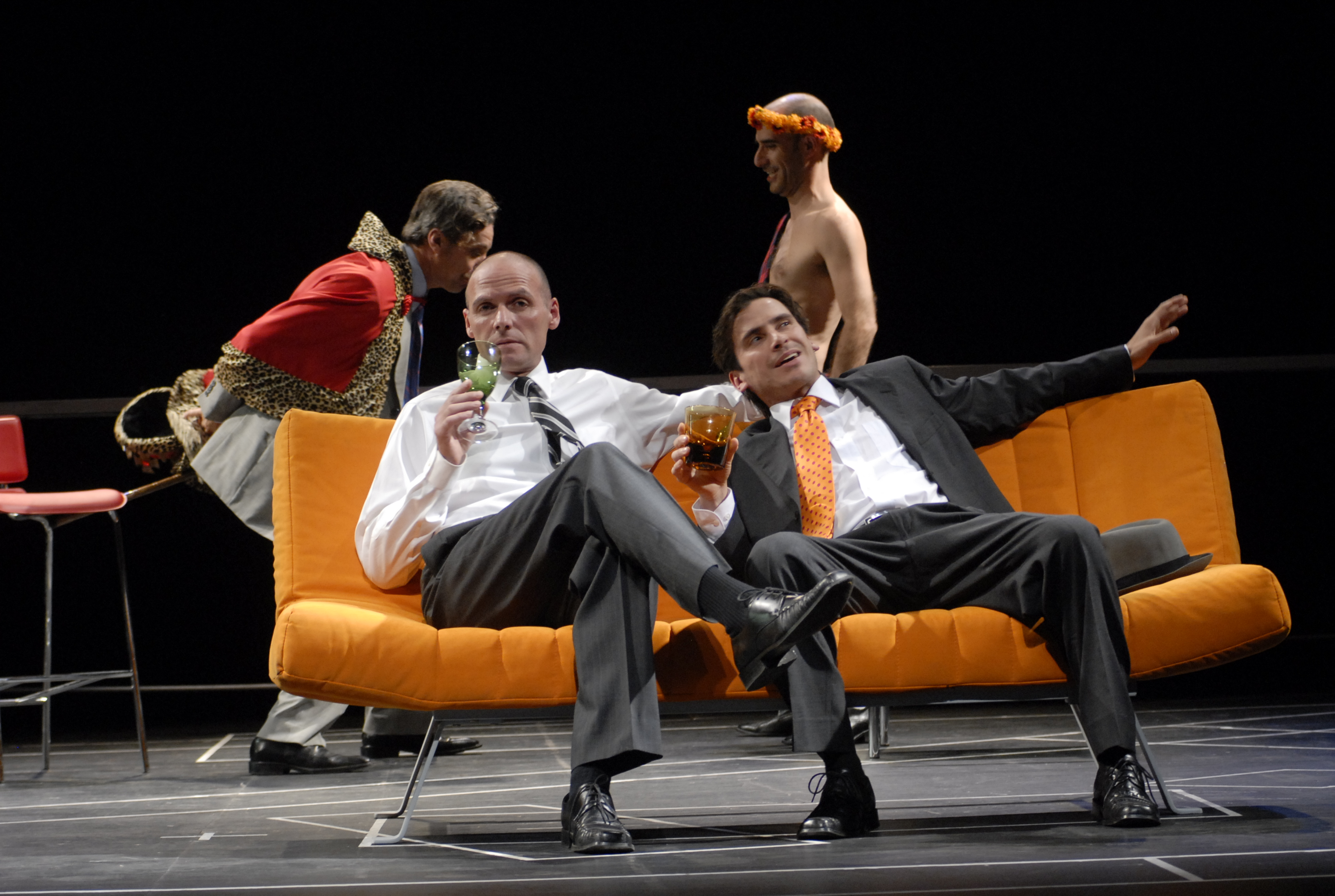 Adaptación de "El Mercader de Venecia", del dramaturgo William Skakespeare, bajo la dirección de Felipe Castro.